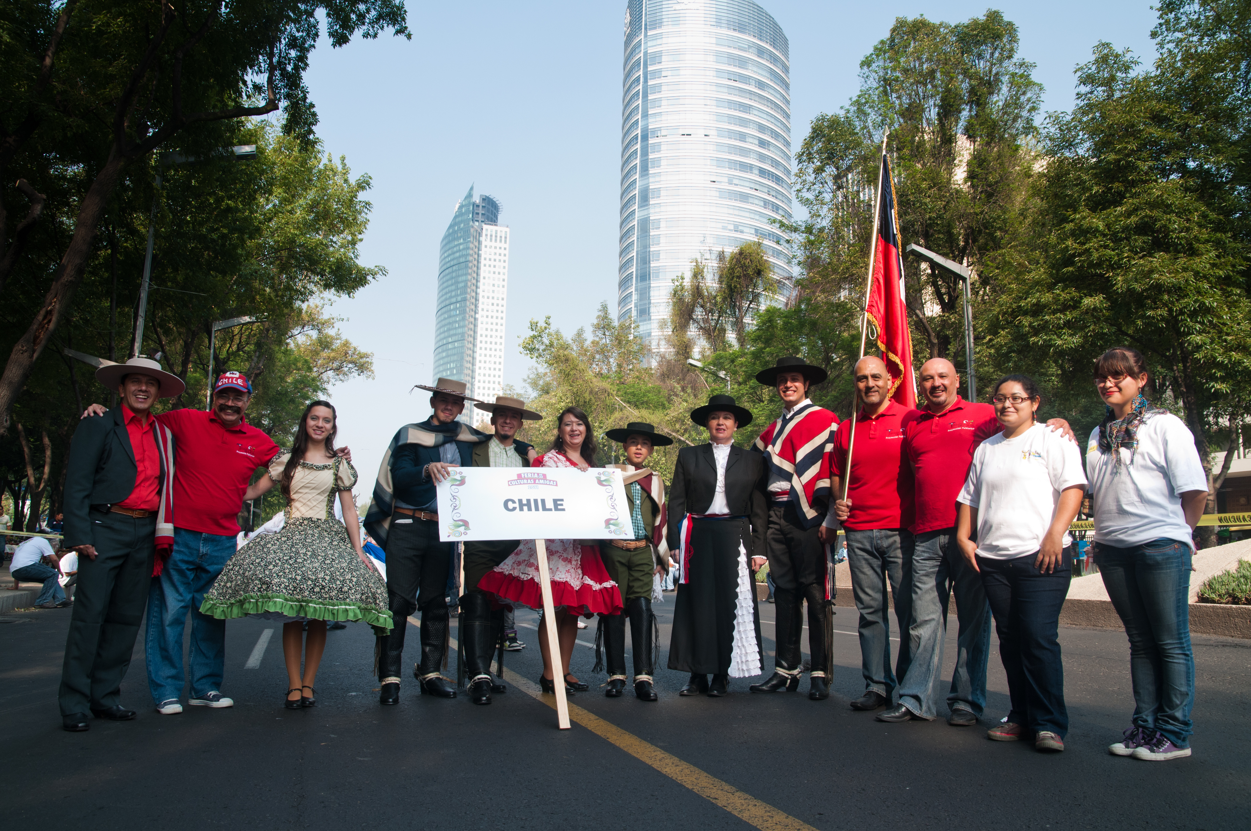 El 14 de Mayo, con un magno desfile, se inauguró la Feria de las Culturas sobre Paseo de la Reforma (Puerta de los Leones en Chapultepec a Glorieta de la Palma). La feria tiene como objetivo dar una pequeña demostración de las culturas de diferentes naciones del Mundo así como la venta y demostración de diversos productos.